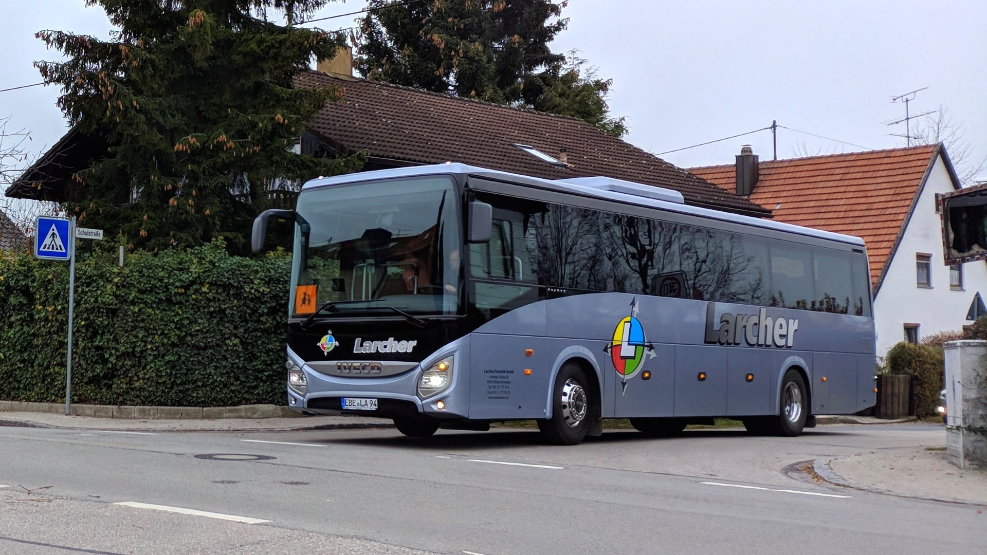 Ein Reisebus der Firma Larcher Touristik aus Markt Schwaben, Typ Iveco Evadys, an der Forsterner Grundschule.